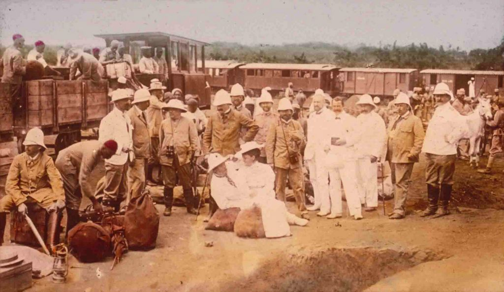 Bahnhof Tengeni mit Zügen der Sigibahn und der Usambara-BahnStandort: StuUB Bildnummer: 027-1425-55 CD-Code: CD/6264/3051/2131/6264_3051_2131_0056 Text auf dem Bild: O.A.Becker II / Aufenthalt auf einer Station der Usambarabahn / Bild 61 Text auf der Hülle: Format Bildträger: 8,5x10 Formale Bemerkung: mit schwarzen Papierstreifen umrandet koloriert Entstehungsjahr: Entstehungsjahr Vorlage: Region: DOA Tansania - Usambara Völker: Afrikaner Europäer Sachgruppe: Bevölkerung Bevölkerung Bevölkerung - Menschenmenge Verkehr - Landverkehr - Eisenbahn Schlagwort: Eisenbahnwagen Menschenmenge Gepäck Station Usambarabahn Lampe